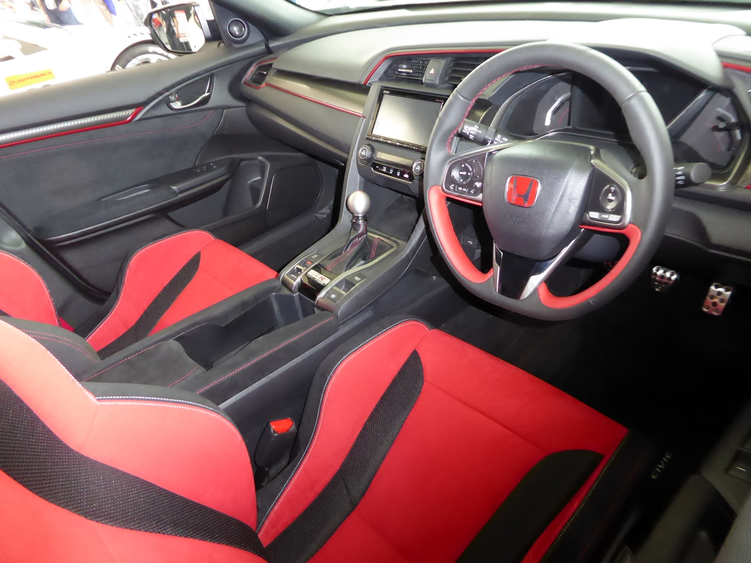 DBA-FK8型ホンダ・シビックタイプRのインテリアを撮影。